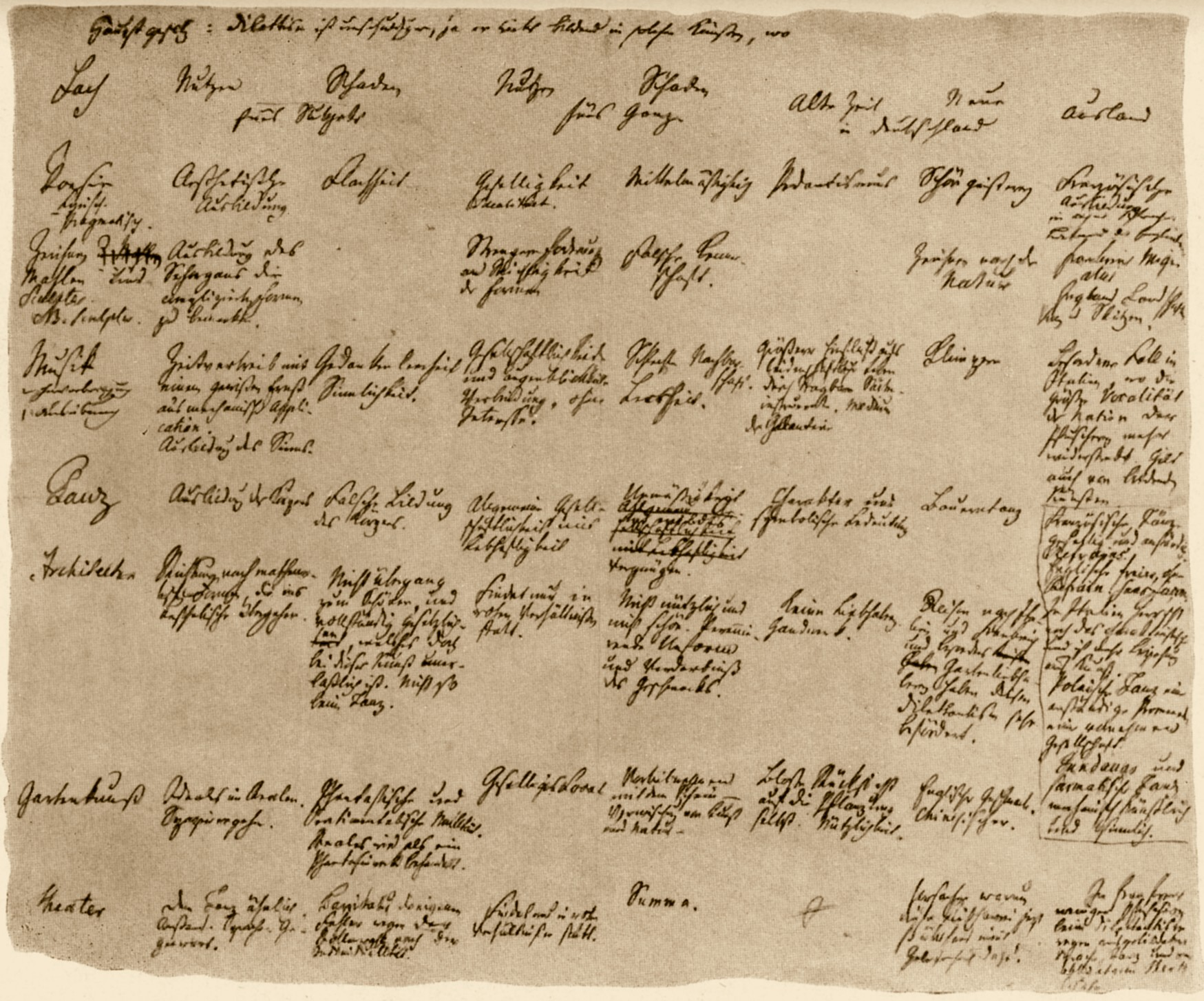 Das Allgemeine Schema der Sammlung Über den Dilettantismus.